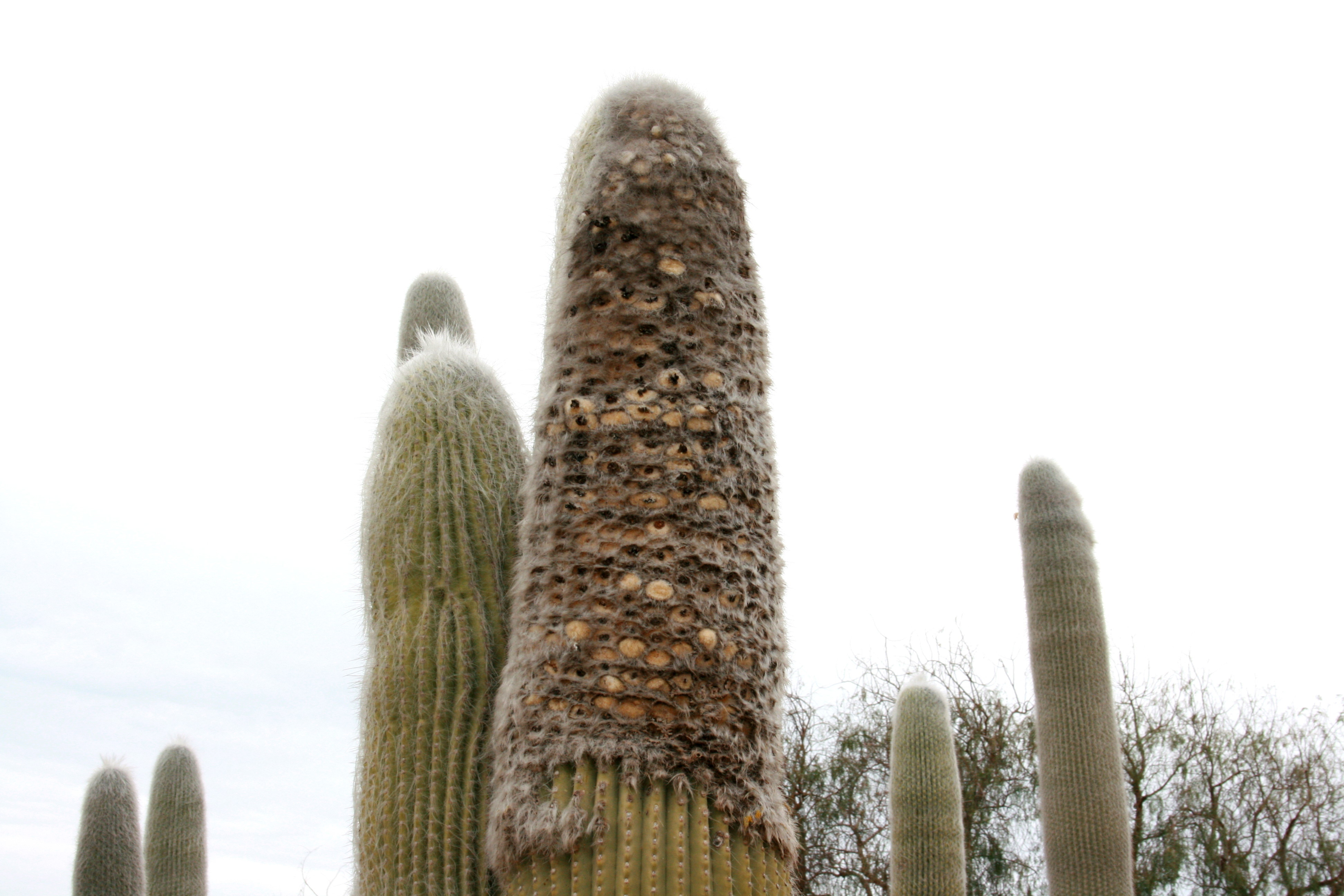 Botanicactus in Ses Salines, Mallorca, Spain